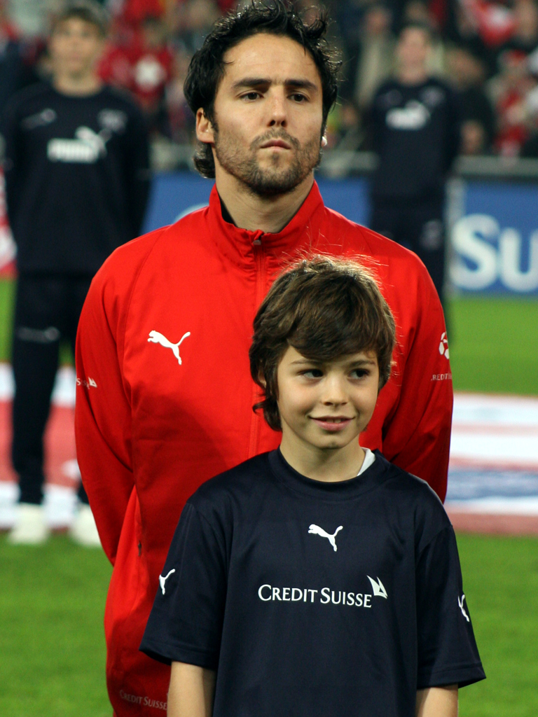 Ricardo Cabanas, St. Jakob Stadion, Basel (Switzerland), Switzerland - Brasil 1:2